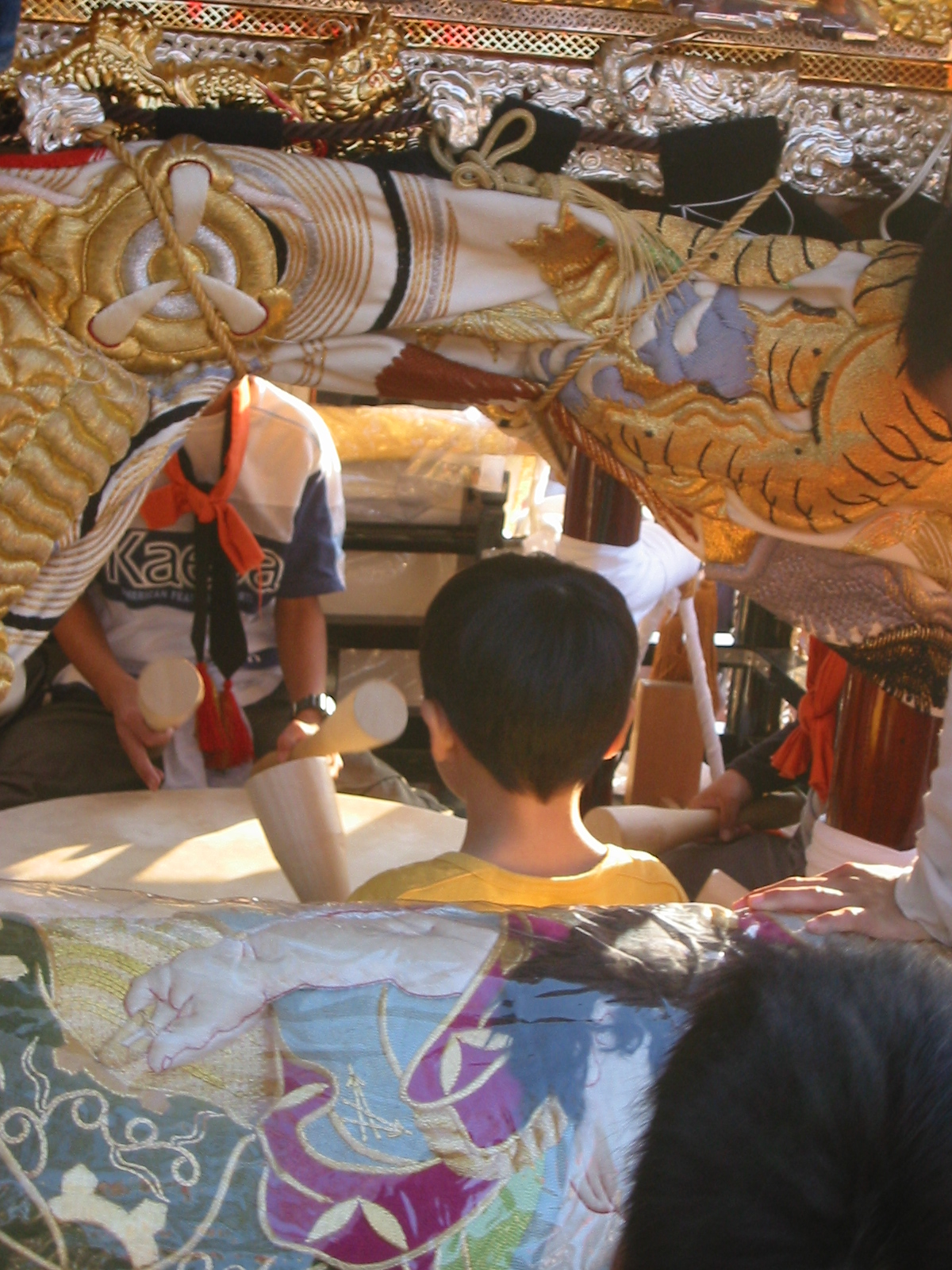 本宮灘のけんか祭り 屋台内部太鼓部分